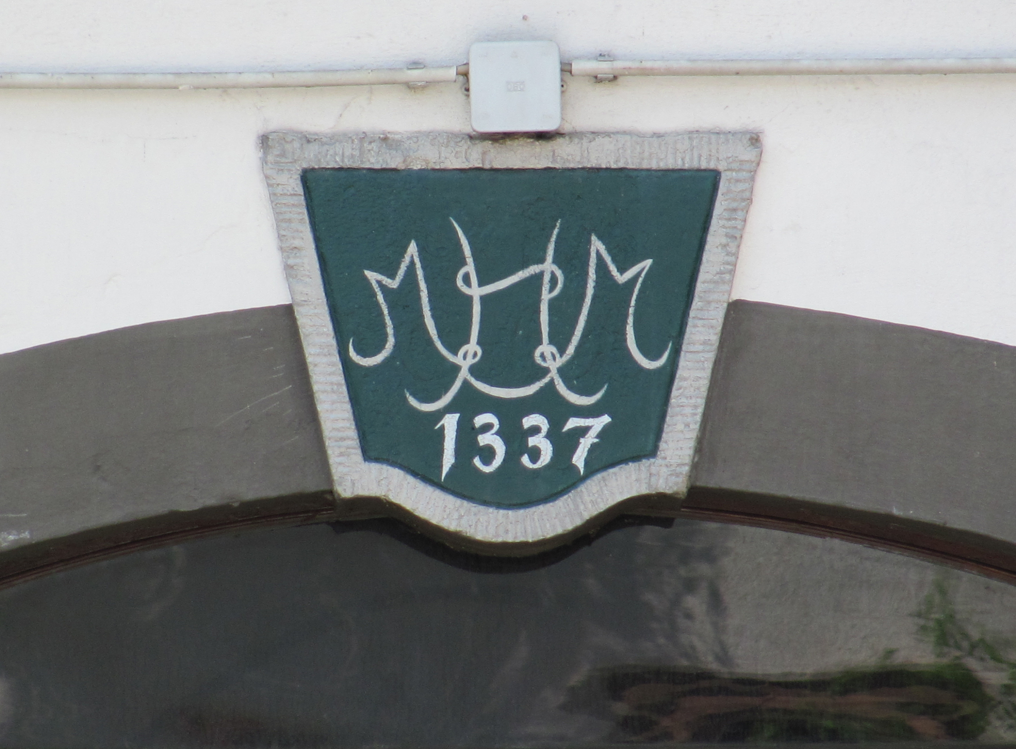 Radebeul, Gasthof Serkowitz, Schlussstein